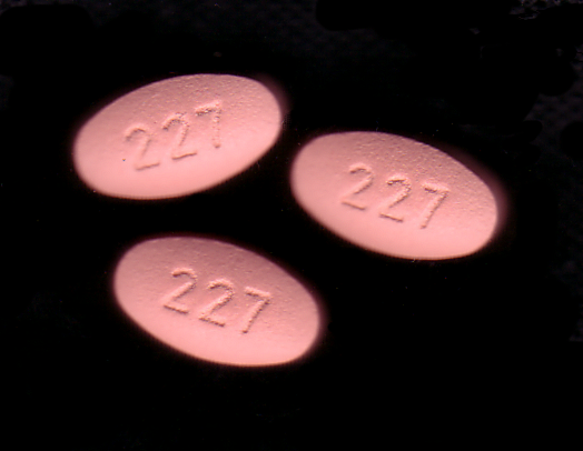 ISENTRESS™ (raltegravir) 400 mg tablets